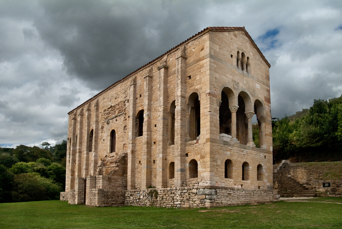 Santa María del Naranco